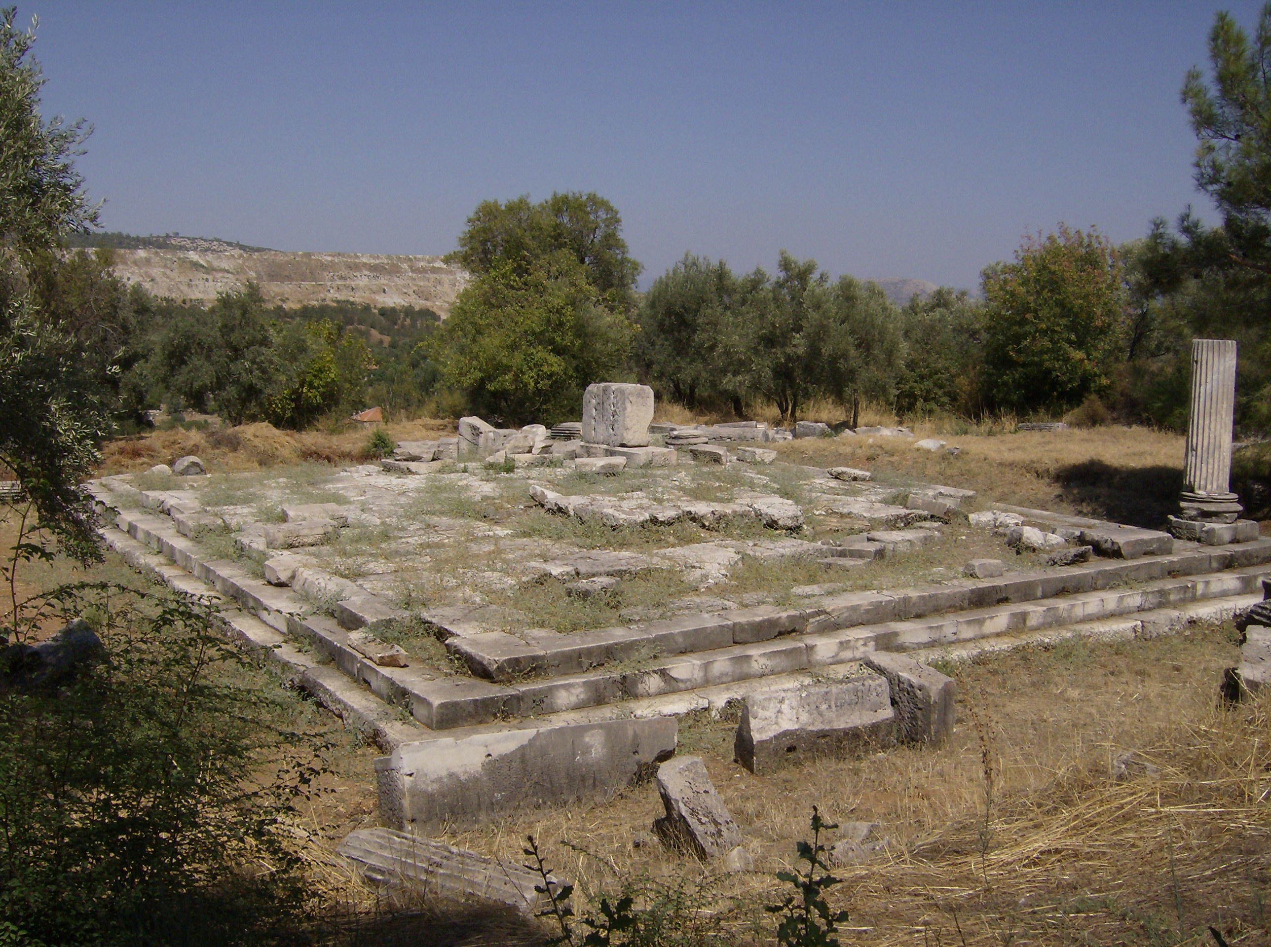 Le temple des empereurs romains à Stratonicée de Carie